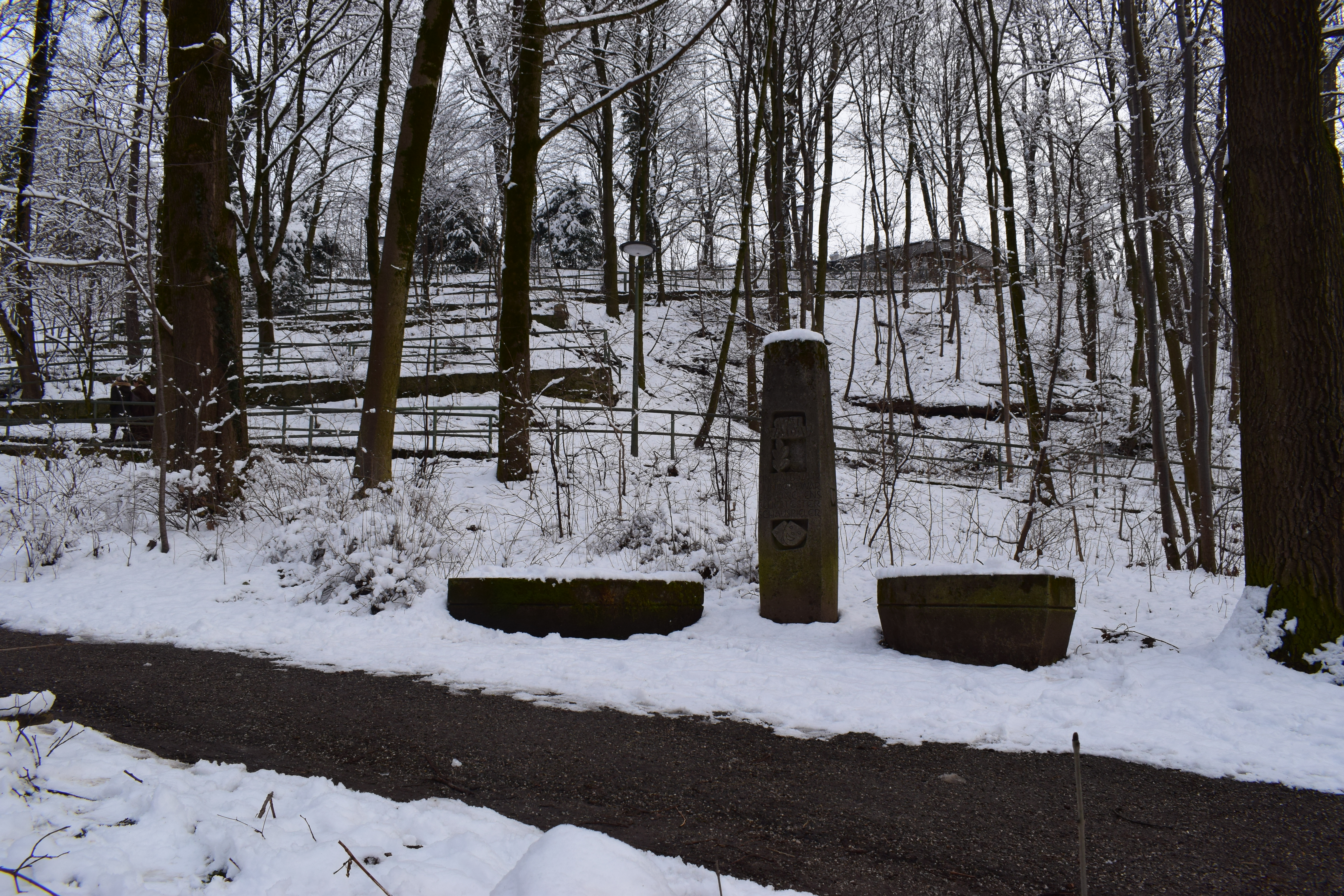 Denkmal an Gustav Waldau in Bogenhausen, München. Das Bild wurde im Winter geschossen. Um das Denkmal herum und auch auf dem Denkmal liegt Schnee.